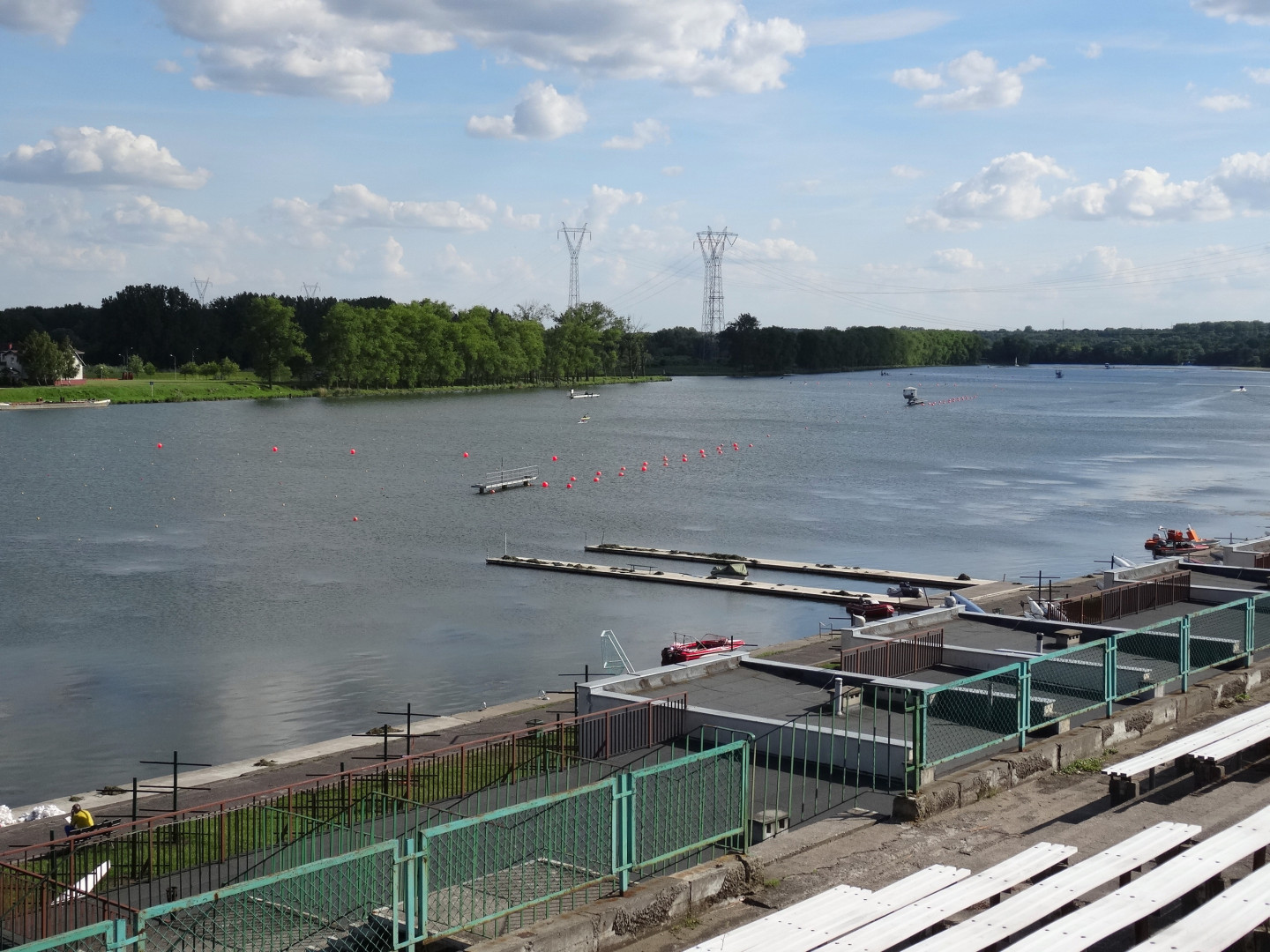 Tor regatowy w Bydgoszczy-Brdyujściu